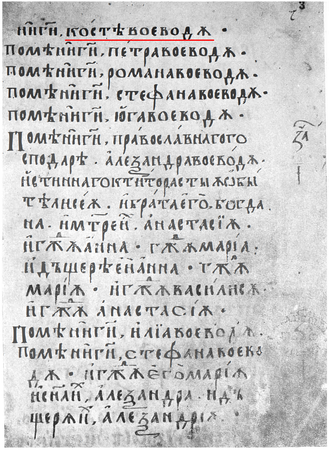 Pagina 3 din pomelnicul Mănăstirii Bistriţa (1460-1470) în care este menţionat "Costea Voevod"